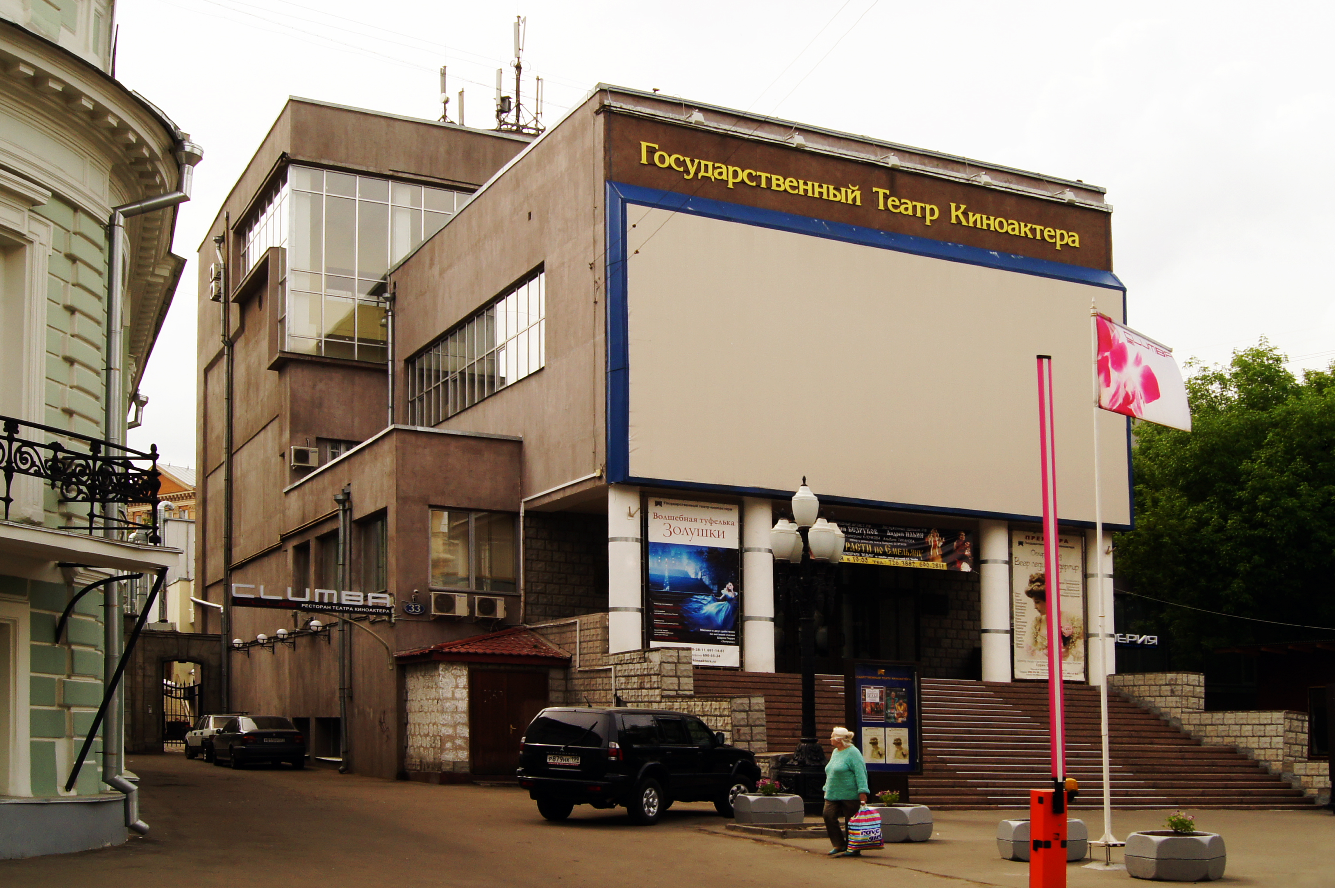 Театр Киноактера